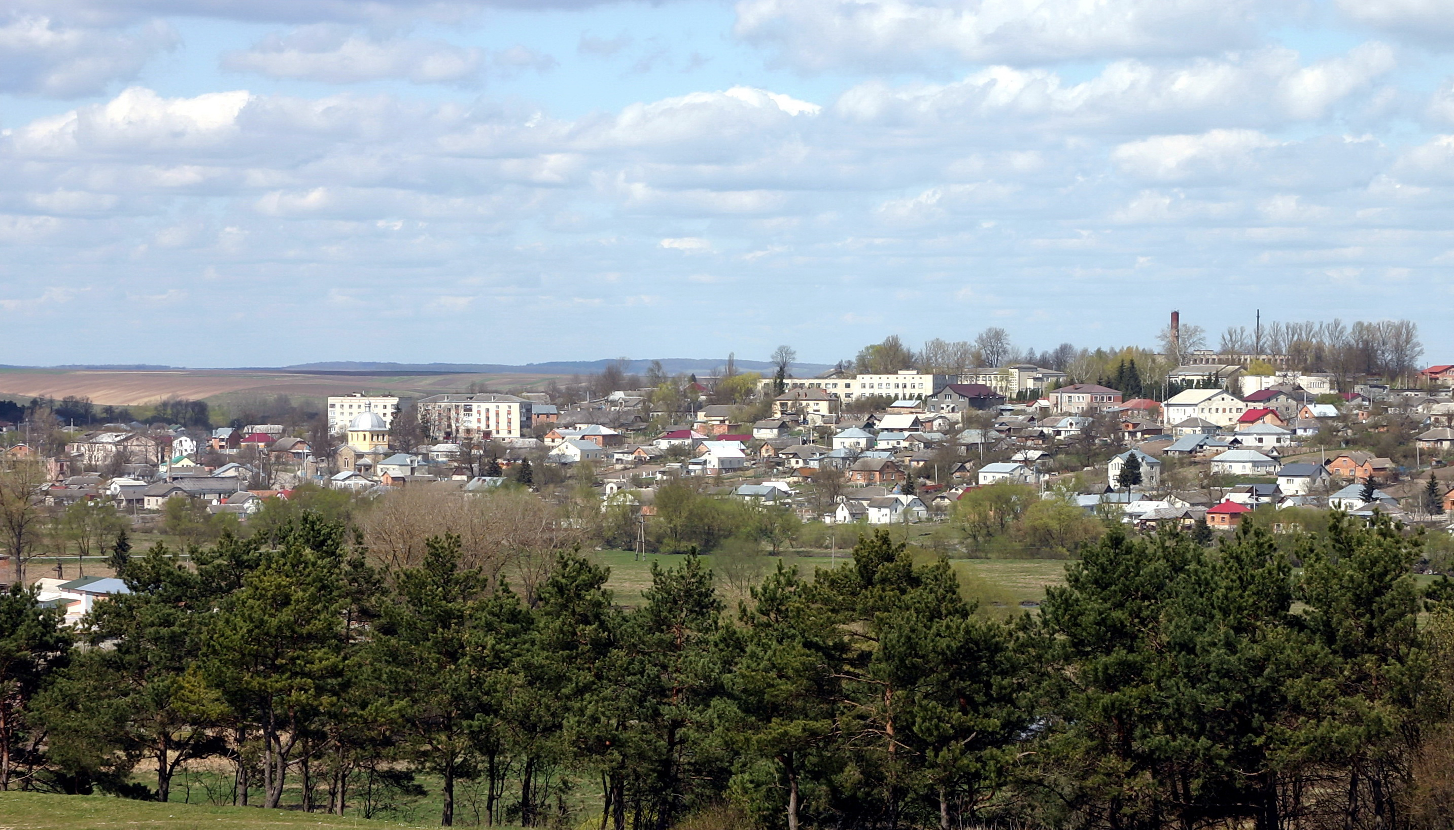 Великі Бірки: краєвид з півдня.